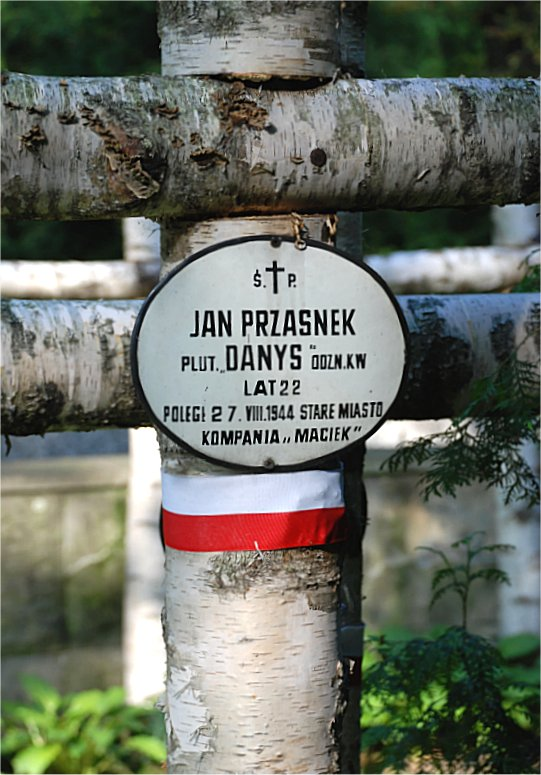 Grób J. Przasnka na Powązkach Wojskowych w Warszawie